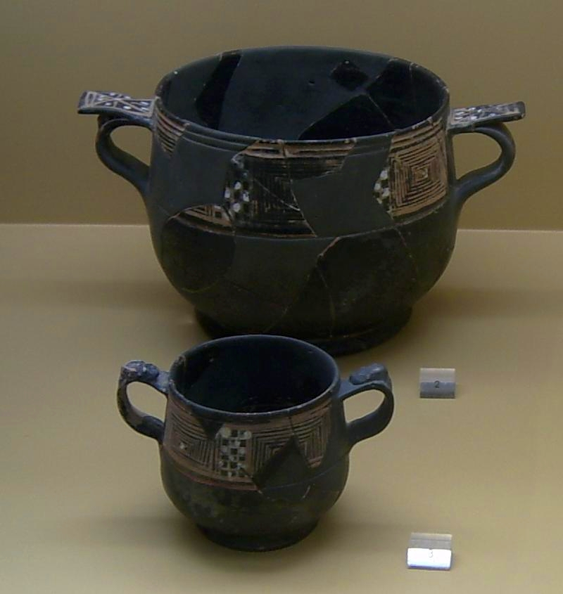 Zwei Kantharoi im Westabhangstil. Konzentrische Vierecke und Schachbretter. Kleiner Kantharos um 225 v. Chr., großer Kantharos um 225/10 v. Chr.; Agora-Museum Athen